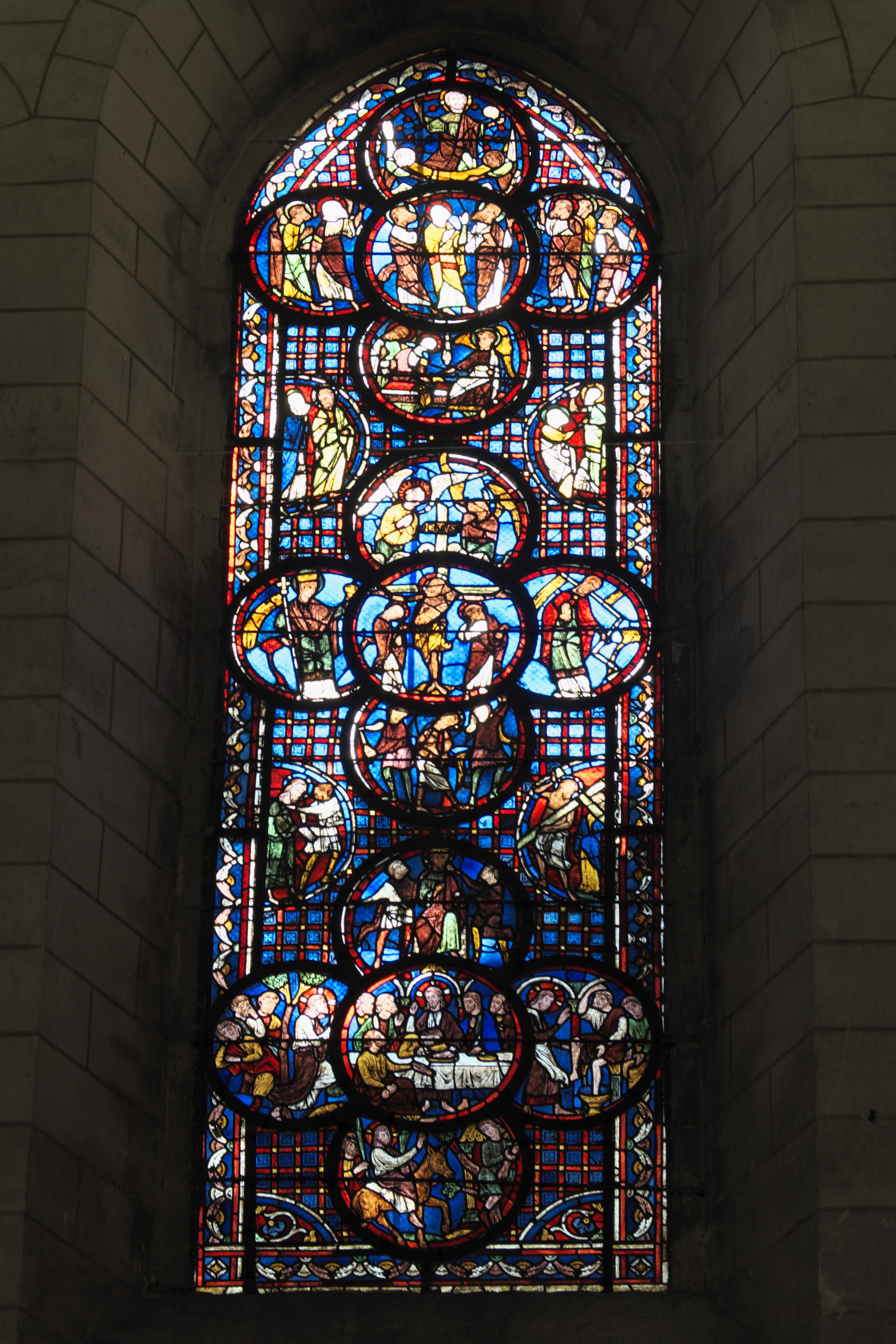 Katholische Pfarrkirche Saint-Vincent-Saint-Germain in Saint-Germain-lès-Corbeil im Département Essonne (Region Île-de-France/Frankreich), Bleiglasfenster aus dem 13. Jahrhundert im Chor; Darstellung: Szenen der Passion